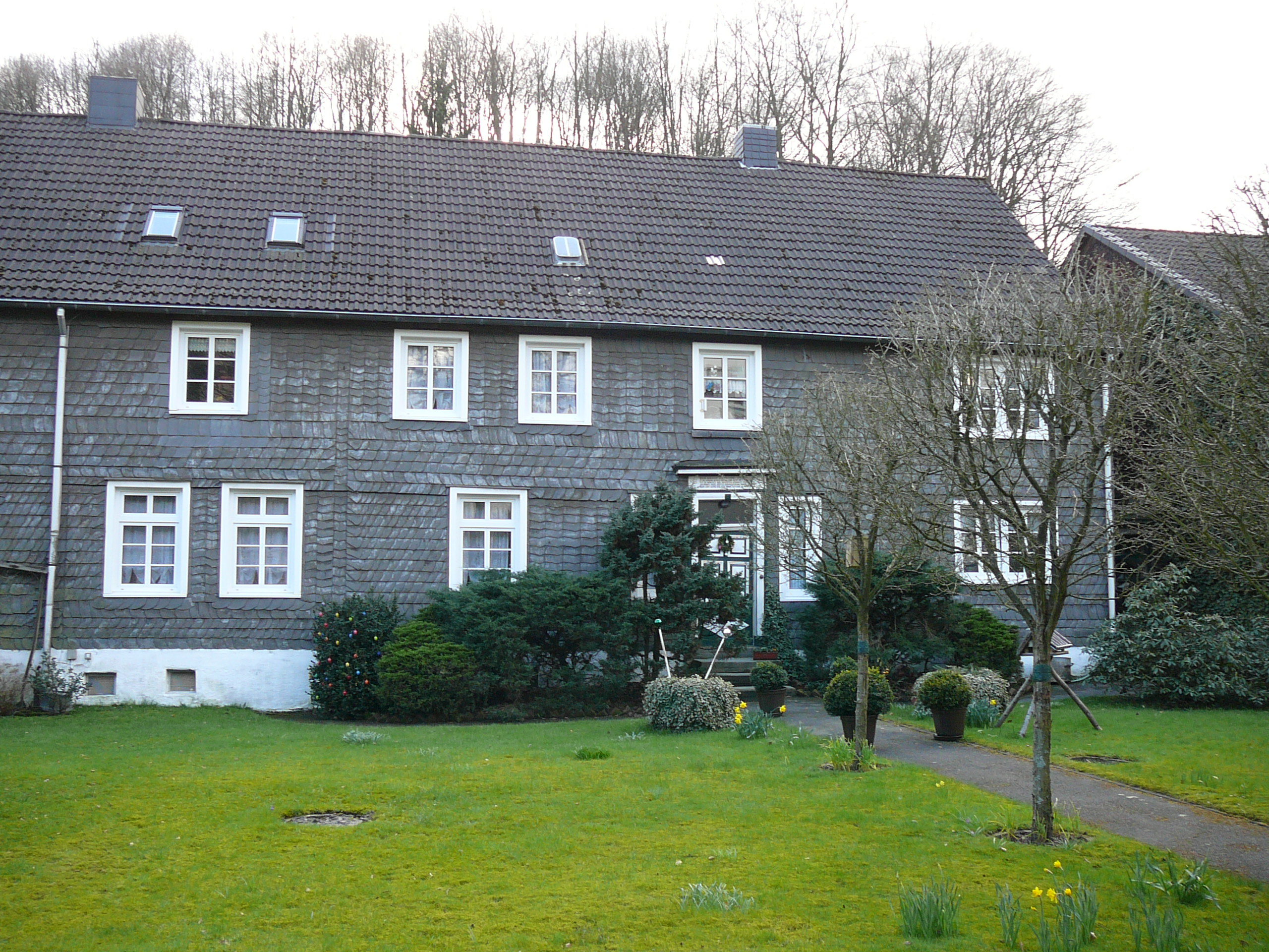 In der Beek, Wuppertal/Katernberg-Uellendahl